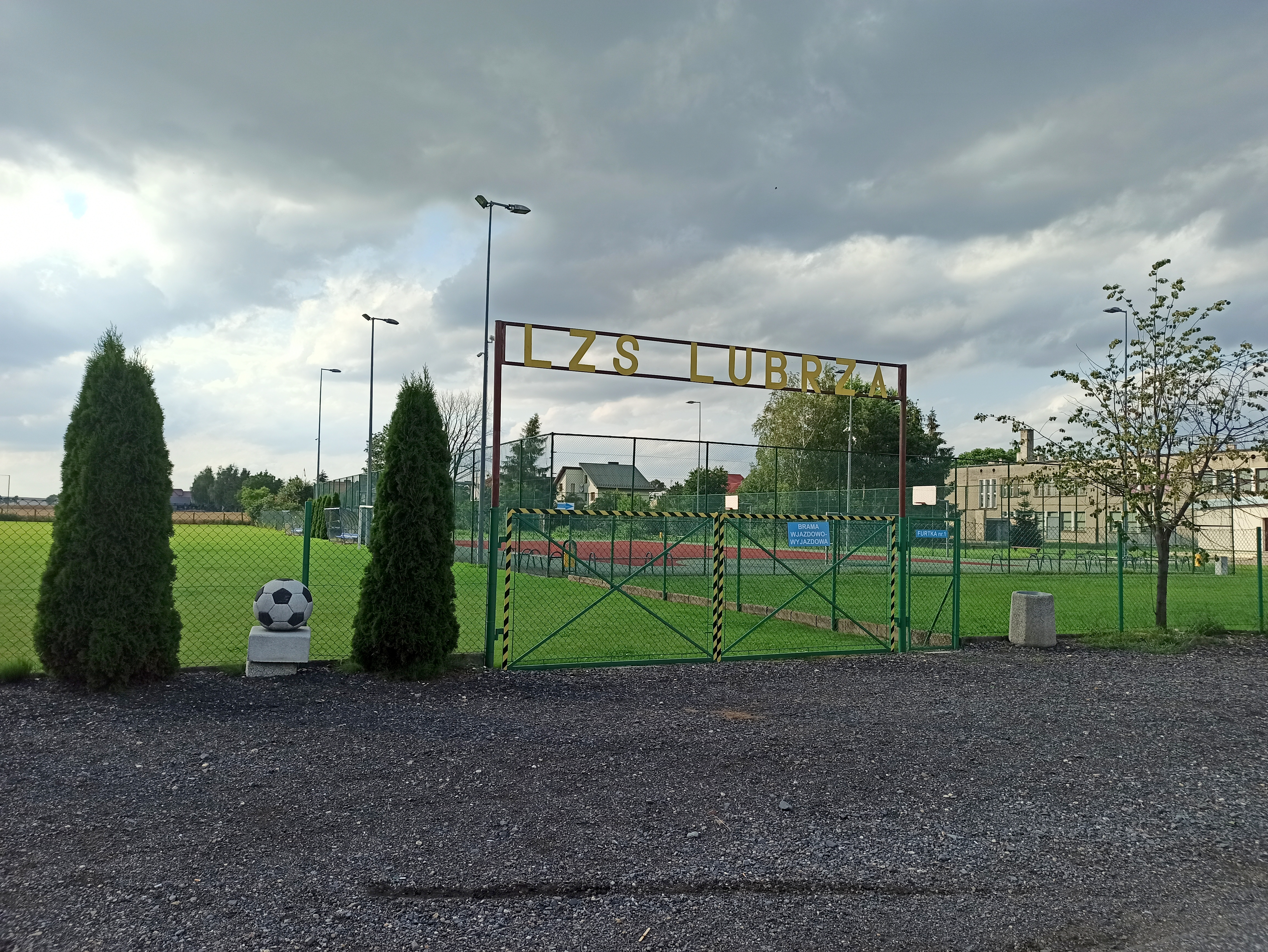 Lubrza – zespół boisk sportowych LZS Lubrza.